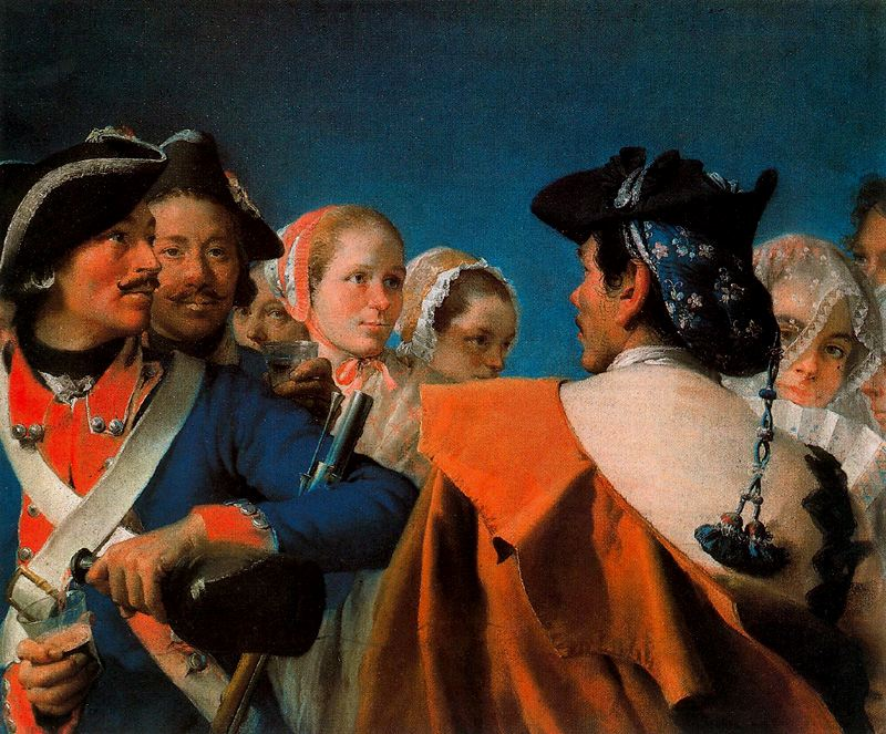 Tipos populareslabel QS:Les,"Tipos populares"